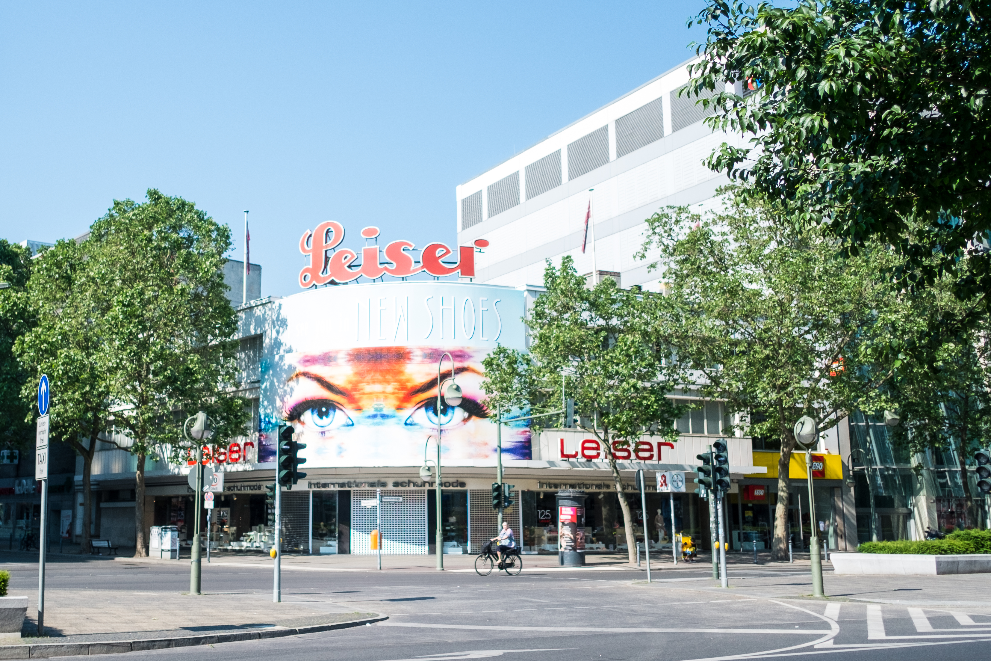 Schuhaus Leiser auf der Tauentzienstraße in Berlin